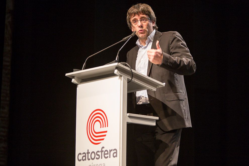 Les Jornades de la Catosfera són un cicle de xerrades en clau tecnològica que pretenen posar de manifest la Internet catalana i la seva activitat en les xarxes socials i les formes de comunicació 2.0.